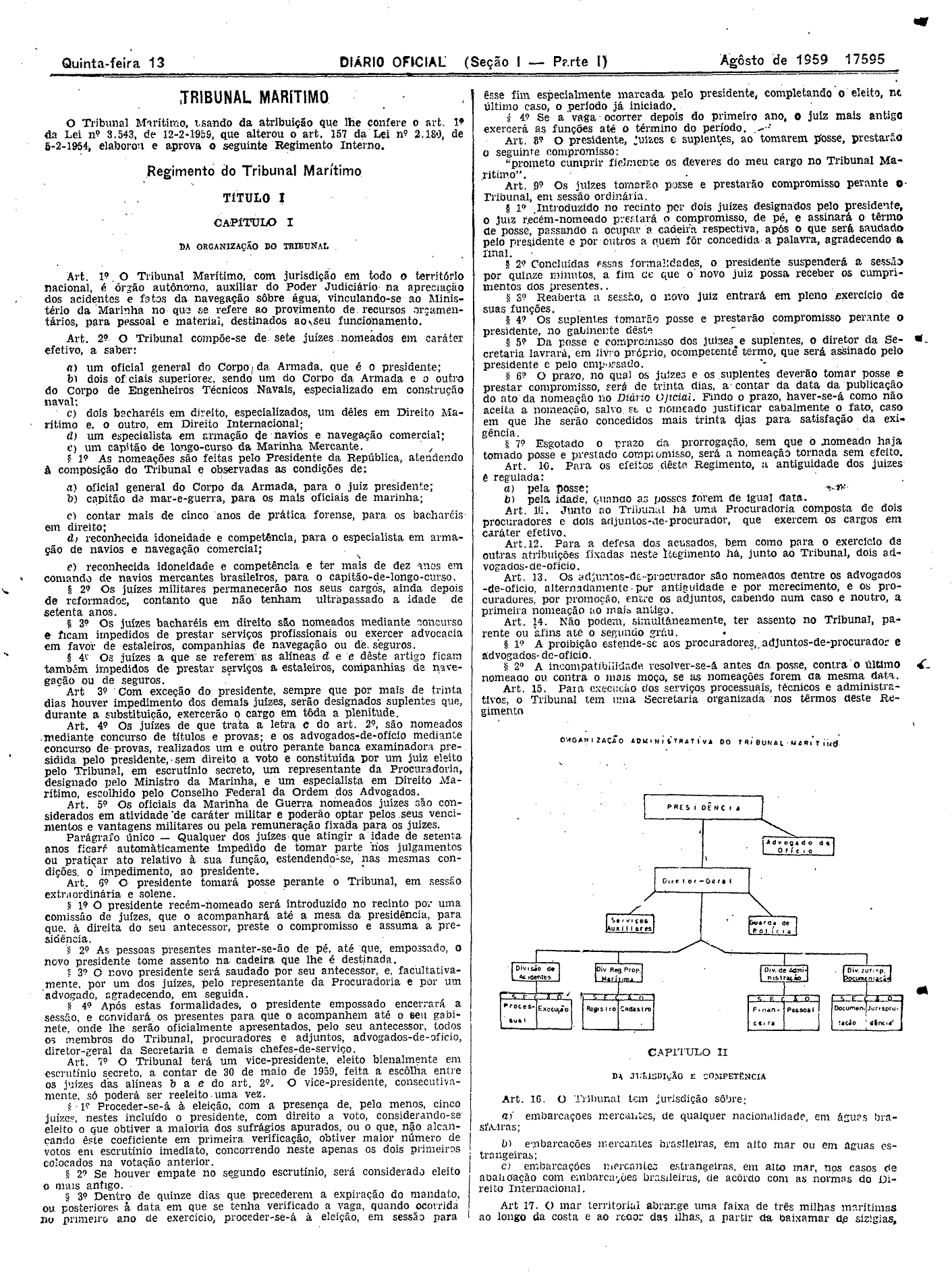 DOU 13/08/1959